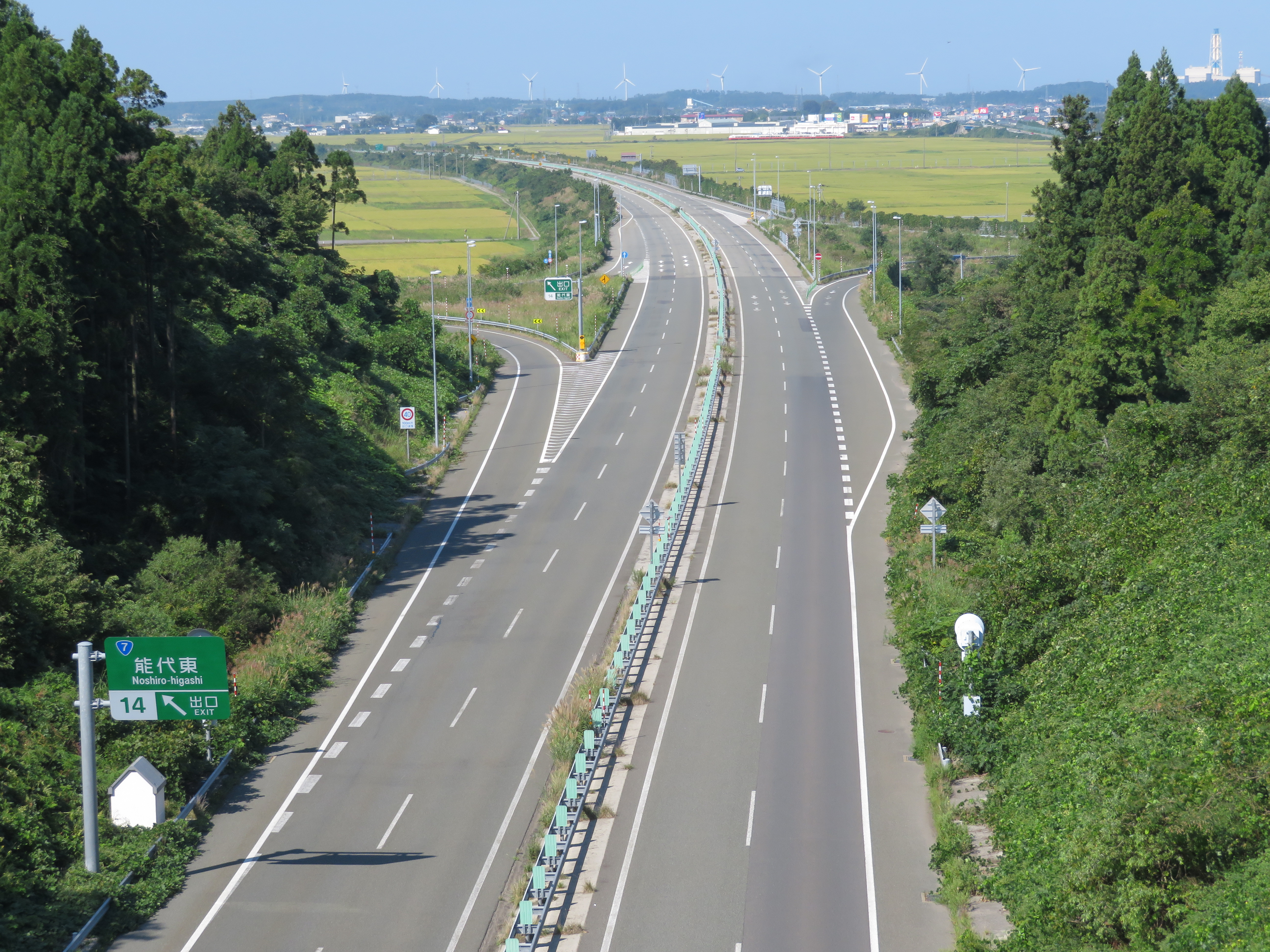 秋田自動車道能代東インターチェンジ出入口付近（鷹巣方面側から撮影） Canon PowerShot SX720 HS